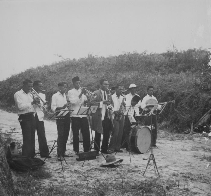 foto. Een jazzband op een weg in Atjeh